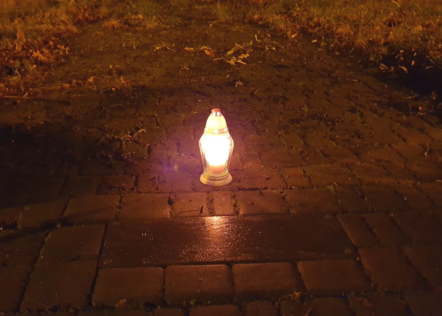 Upamiętnienie. Połczyn-Zdrój